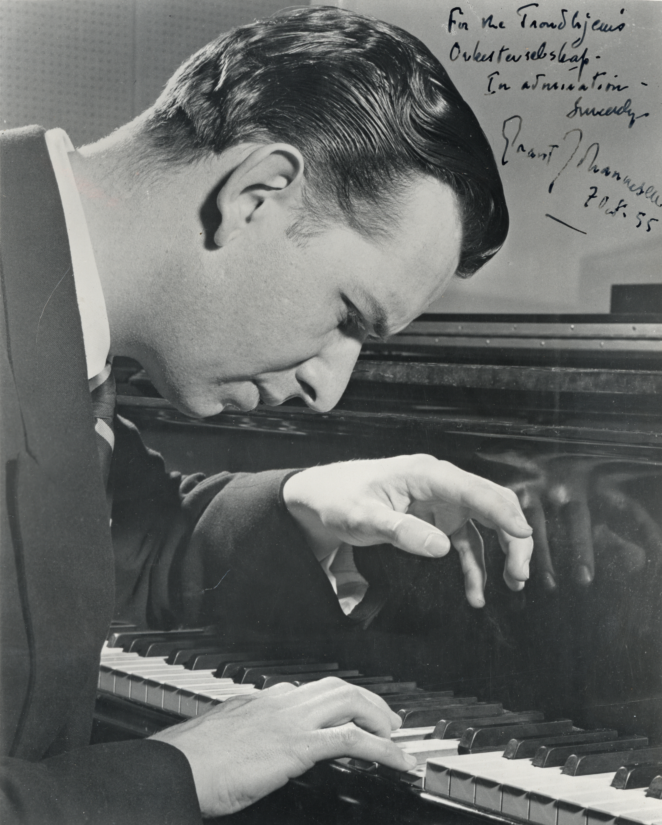 Format: Fotopositiv Dato / Date: 1955 Fotograf / Photographer: Ukjent Sted / Place: Ukjent Wikipedia: Grant_Johannesen Wikipedia: Olaf_T._Ranum Eier / Owner Institution: Trondheim byarkiv, The Municipal Archives of Trondheim Arkivreferanse / Archive reference: TorH45 - F9469 Merknad: Bildet har ukjent opprinnelse, men er antagelig donert Byarkivet av Olaf T. Ranum (1914 - 2004). Billedtekst: For the Trondhjems orkesterselskap - in admiration - Sincerely, Grant Johannesen, 1955